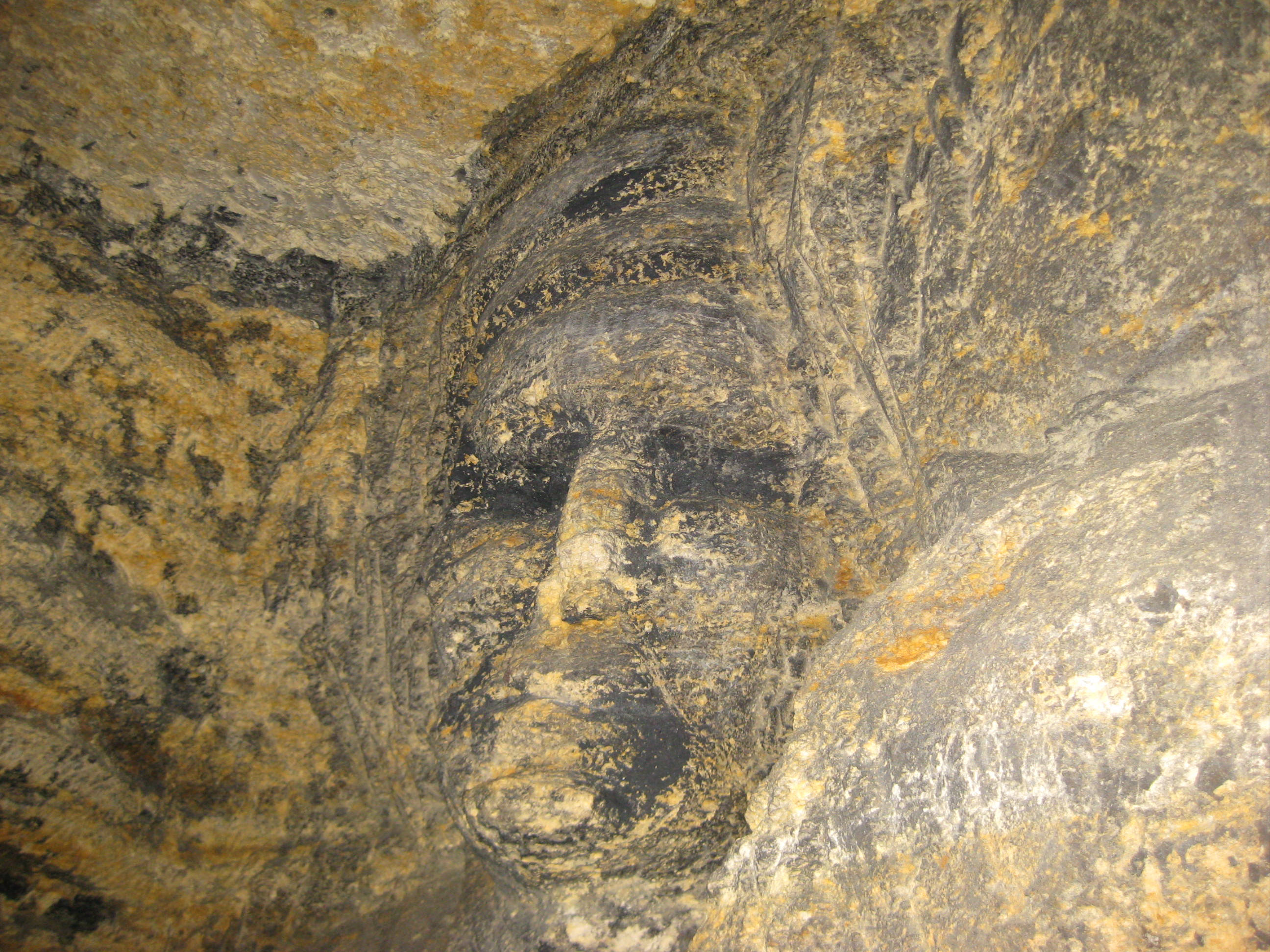 Muurschildering in de catacomben van Odessa, Oekraïne